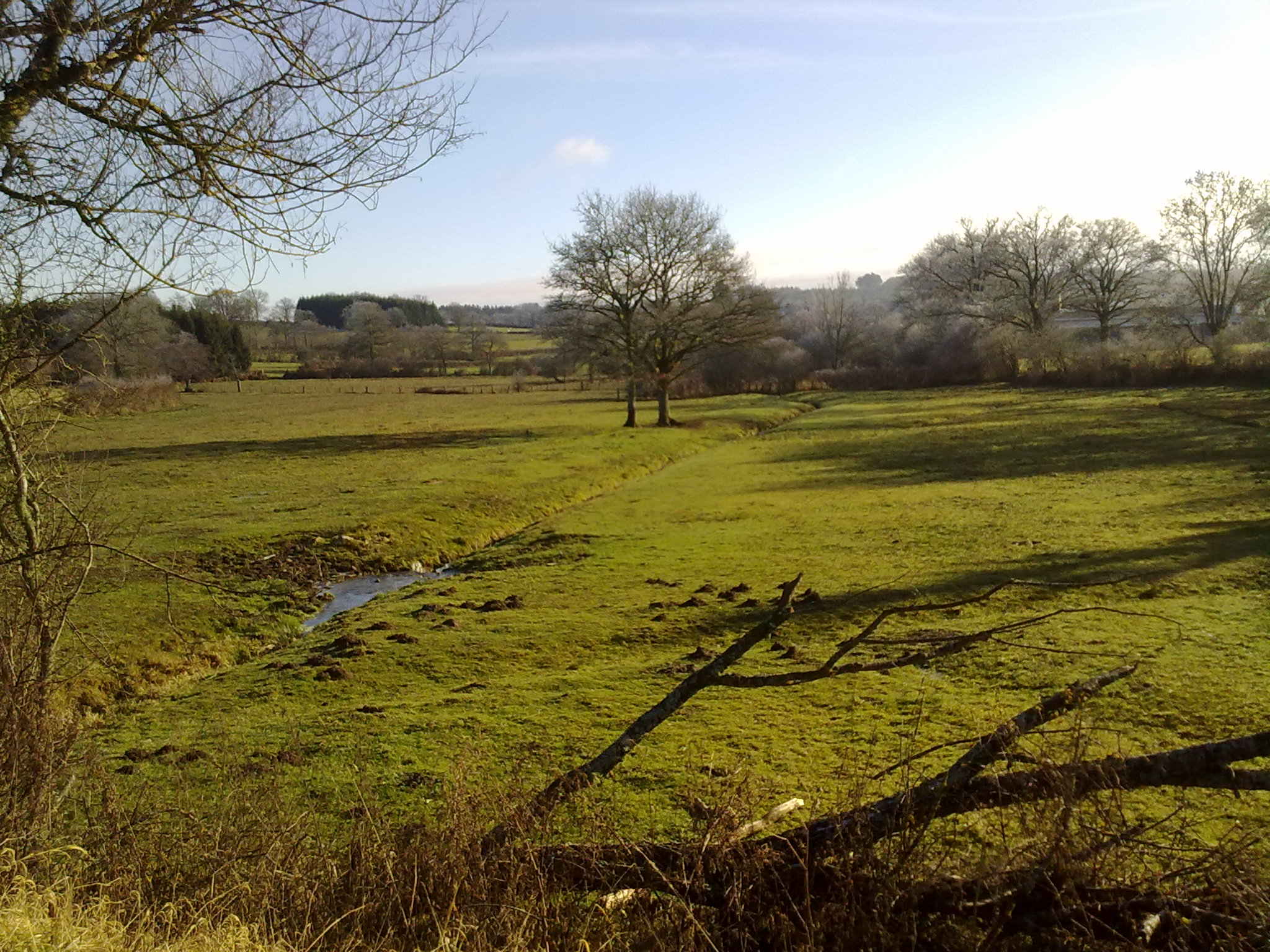 Photo de la campagne d'Espinasse vue de la D13